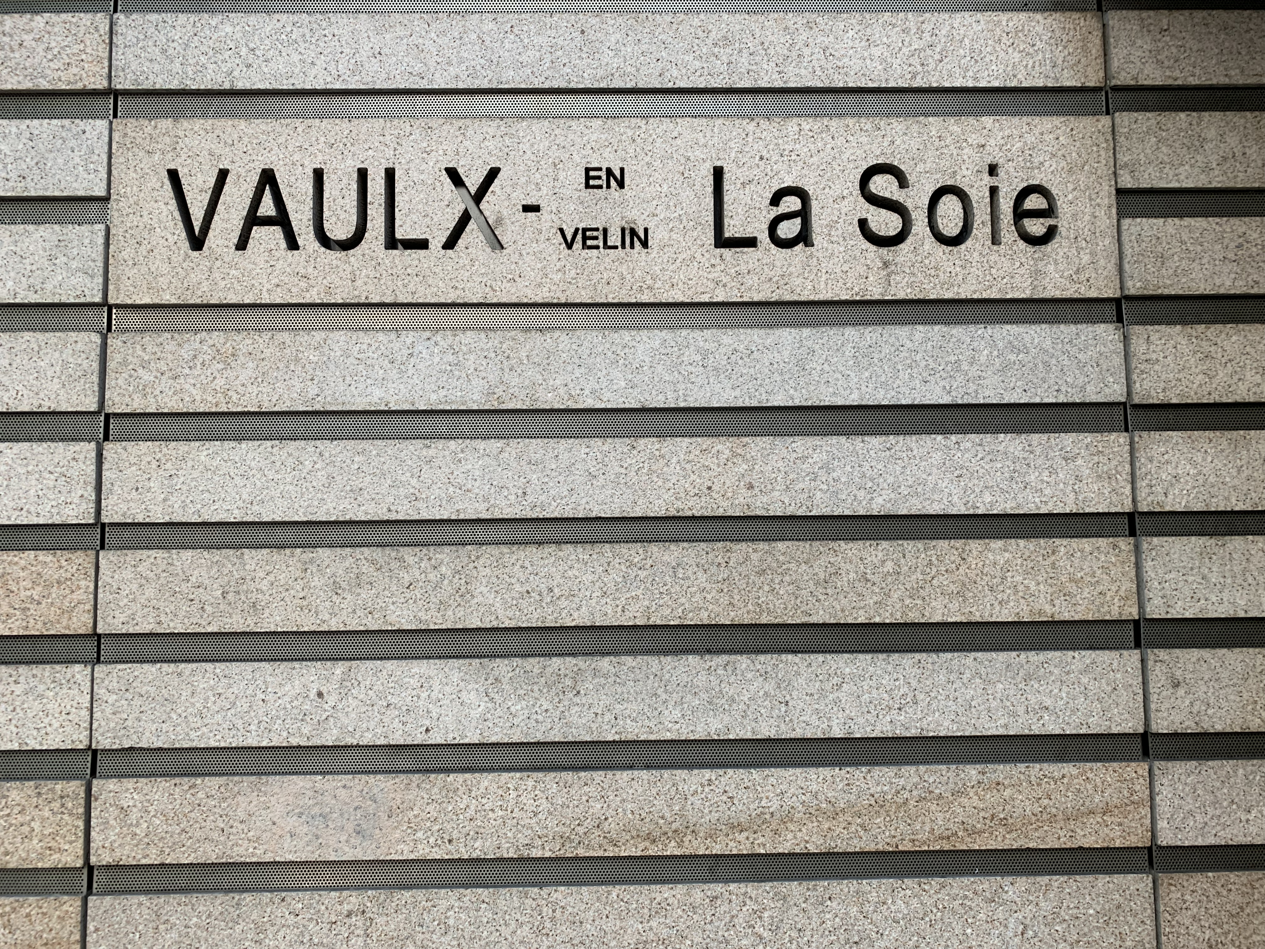 Vaulx-en-Velin - La Soie (Lyon Metro), avril 2019.